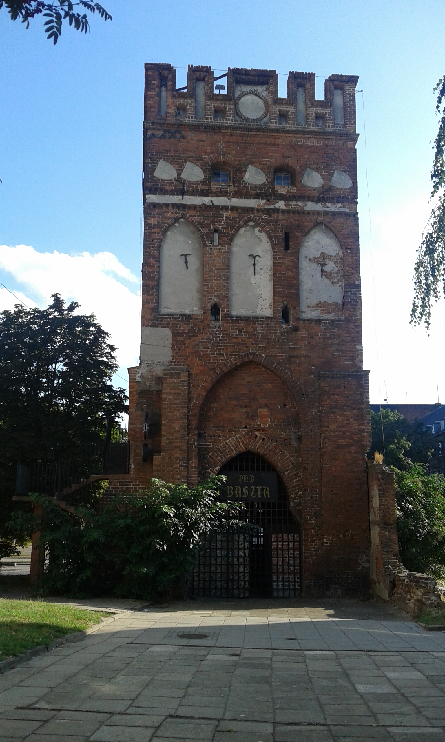 Malbork, Brama Mariacka (Przewozowa, Sztumska), 2 poł. XIV